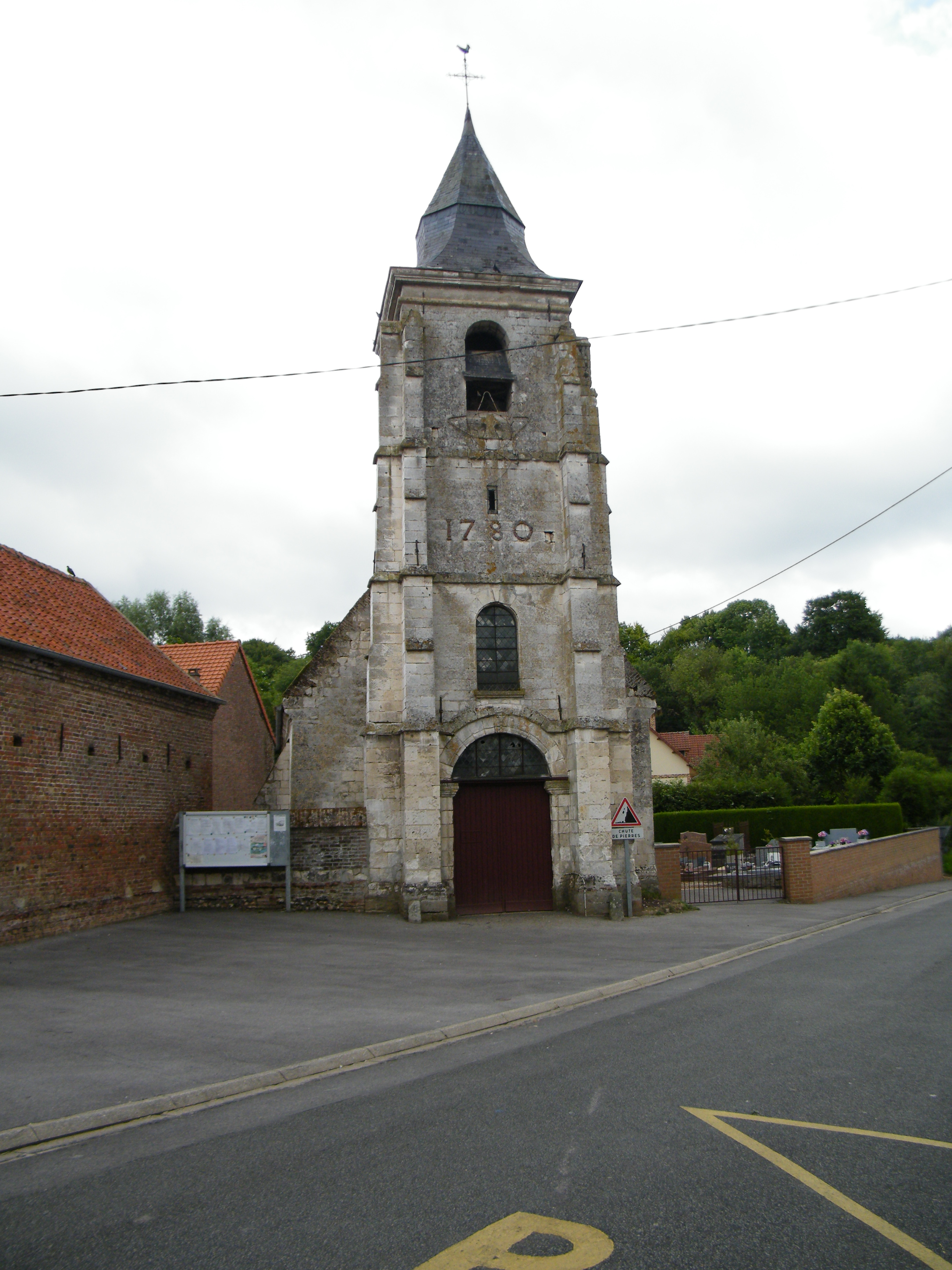 Eglise saint-Médard, du hameau de Saint-Hilaire à Lanches-Saint-Hilaire.